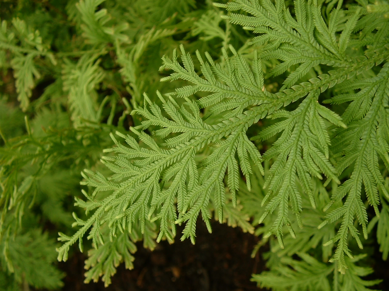 Selaginella ornithopodioides photo by Jeffdelonge Jardin botanique de Lyon, avril 2006